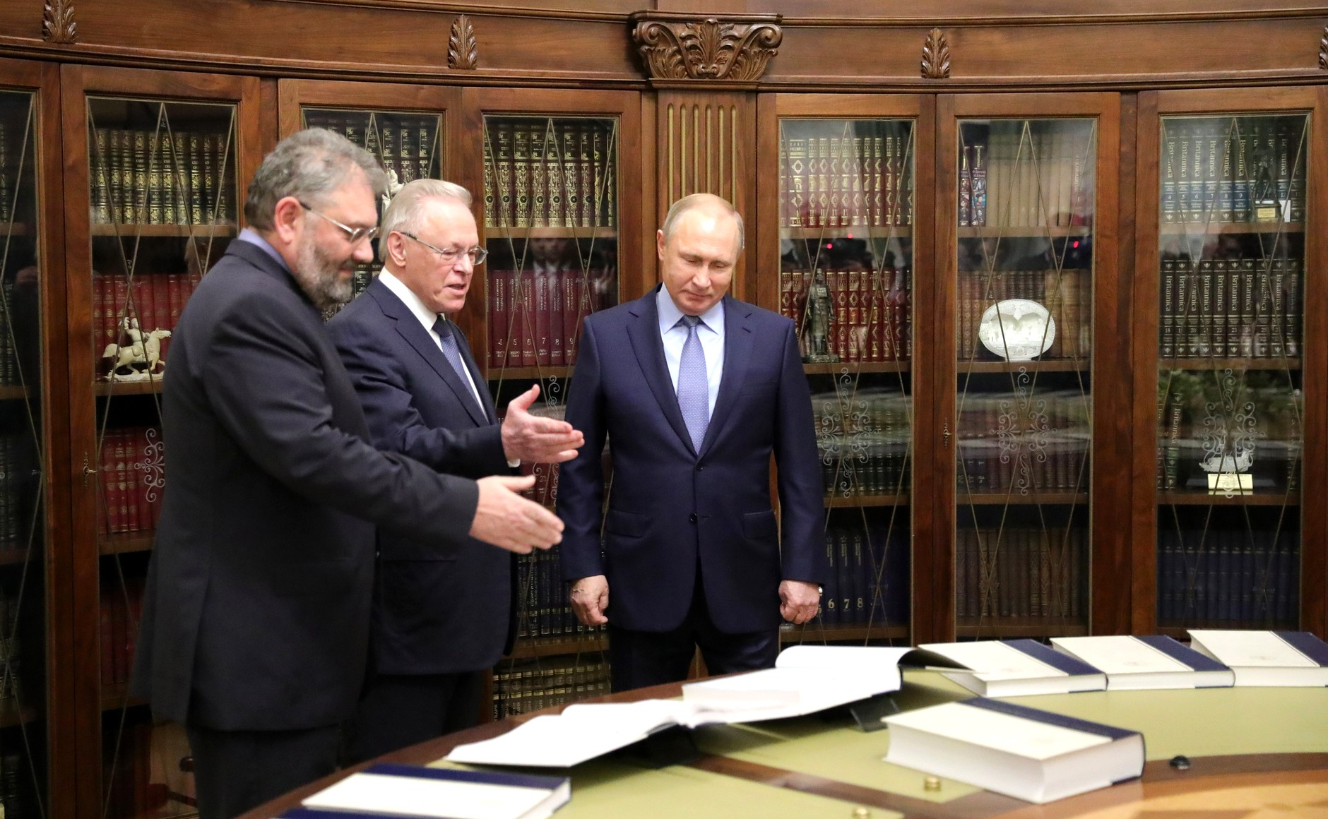 Академик РАН Юрий Осипов и ответственный редактор издательства «Большая российская энциклопедия» Сергей Кравец представили Владимиру Путину состоящее из 35 томов собрание Большой российской энциклопедии. С академиком РАН Юрием Осиповым (в центре) и ответственным редактором «Большой российской энциклопедии» Сергеем Кравцом.